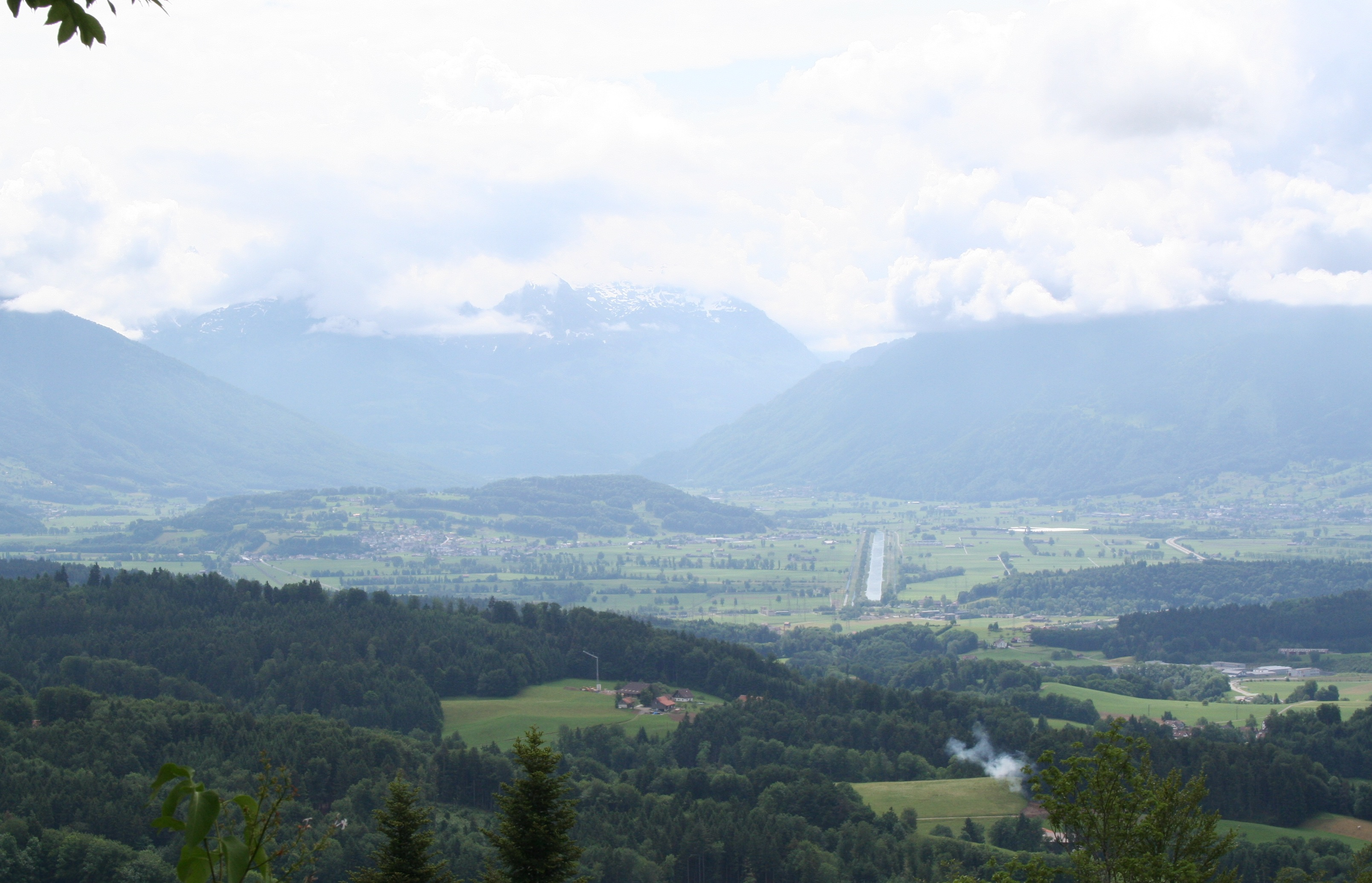 Linthebene mit Benkener Büchel, Blick nach Südwesten